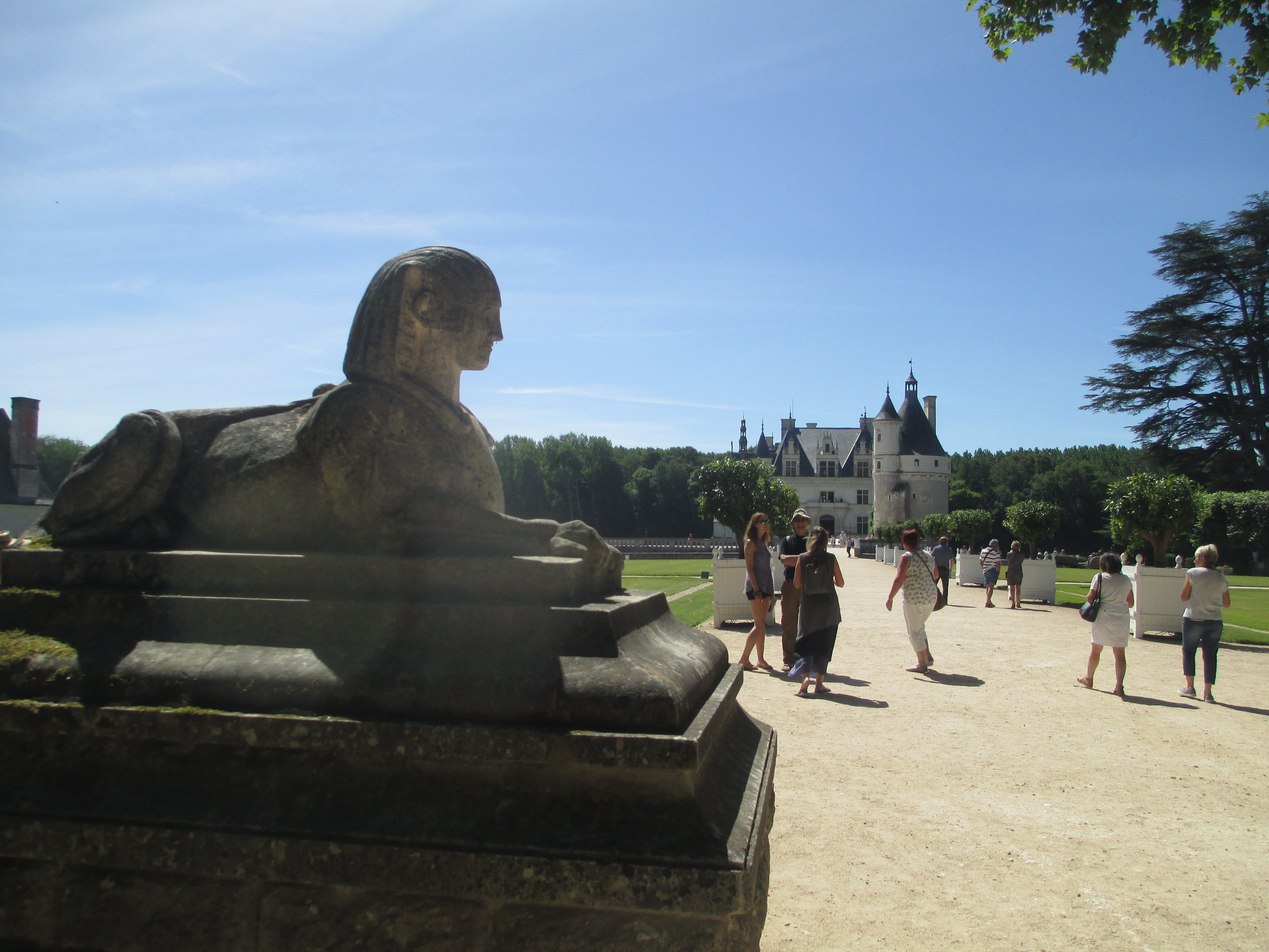 פסל ספינקס בכניסה לטירת שנונסו